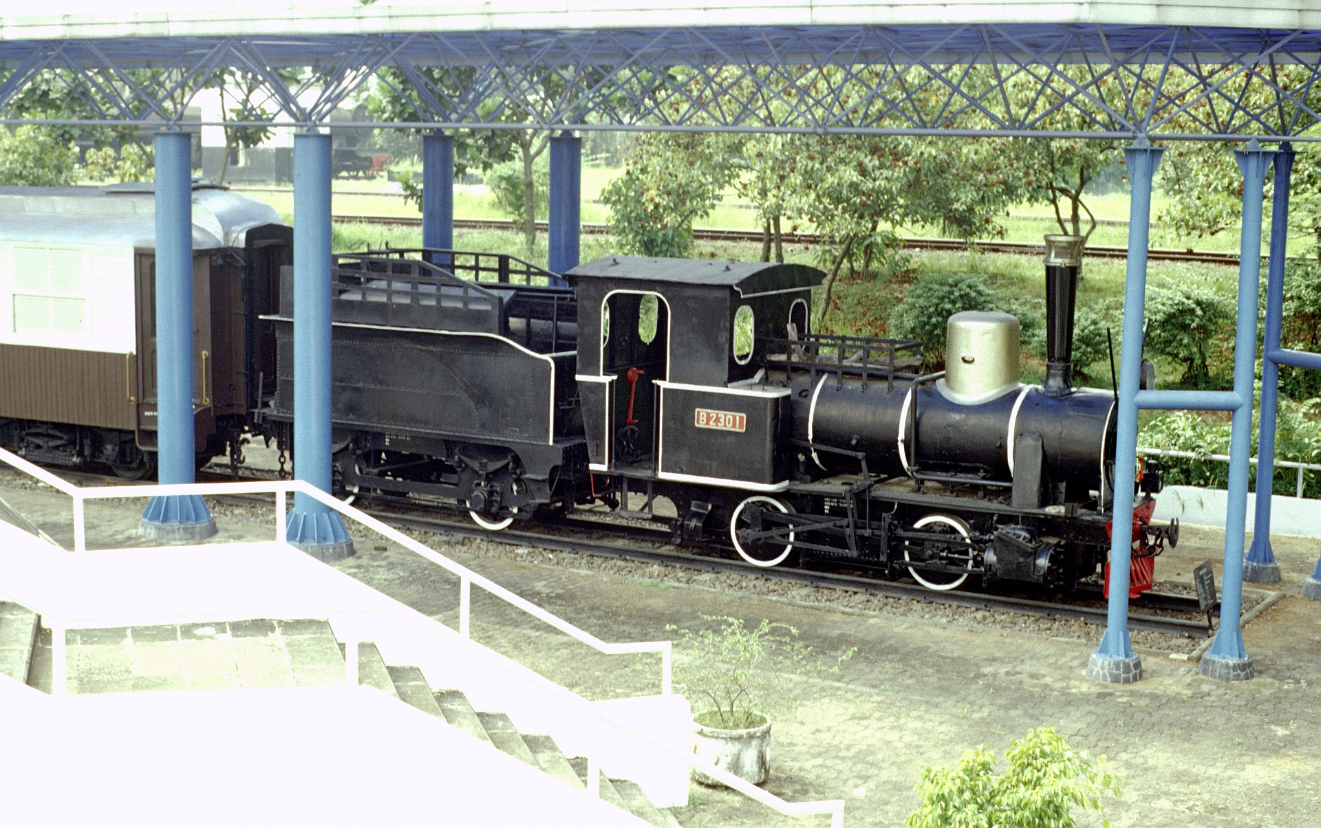 DKA B23 (A